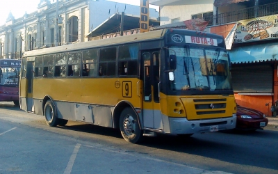 Ruta 9 de Transregio